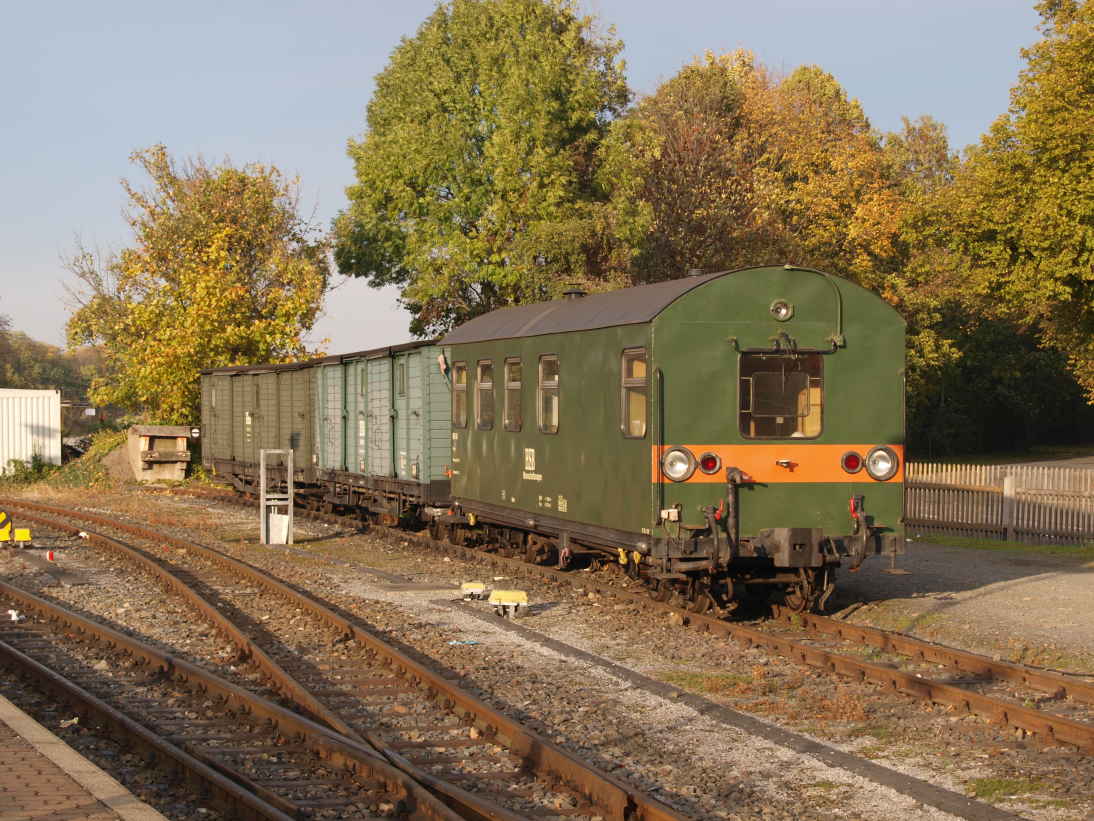 Hilfszug der HSB in Wernigerode Wt, 23. Oktober 2010